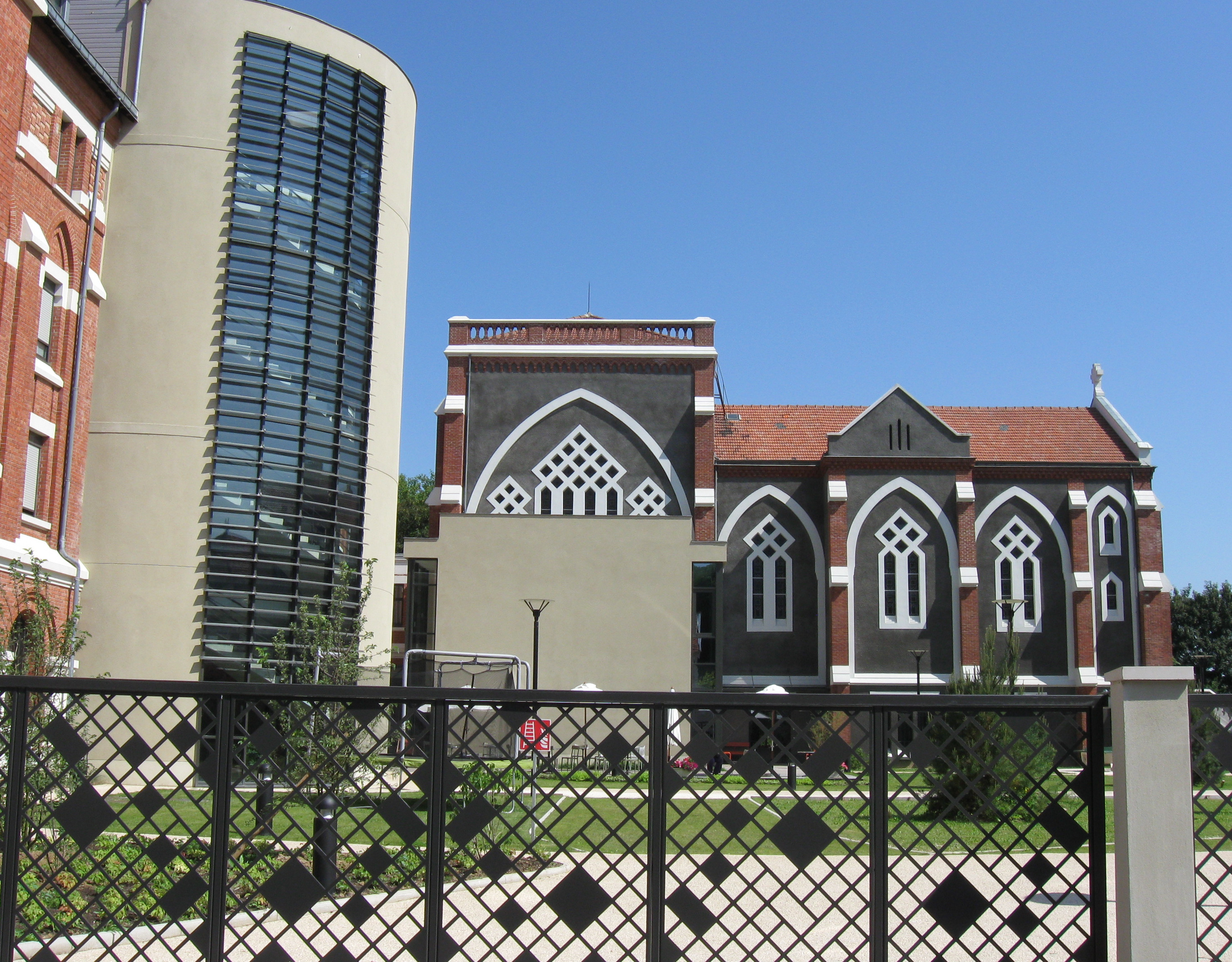 Chapelle de l'ancien séminaire de Saint-Jean-les-Deux-Jumeaux. (département de la Seine-et-Marne, région Île-de-France).